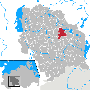 Techentin in Mecklenburg-Vorpommern - District Parchim